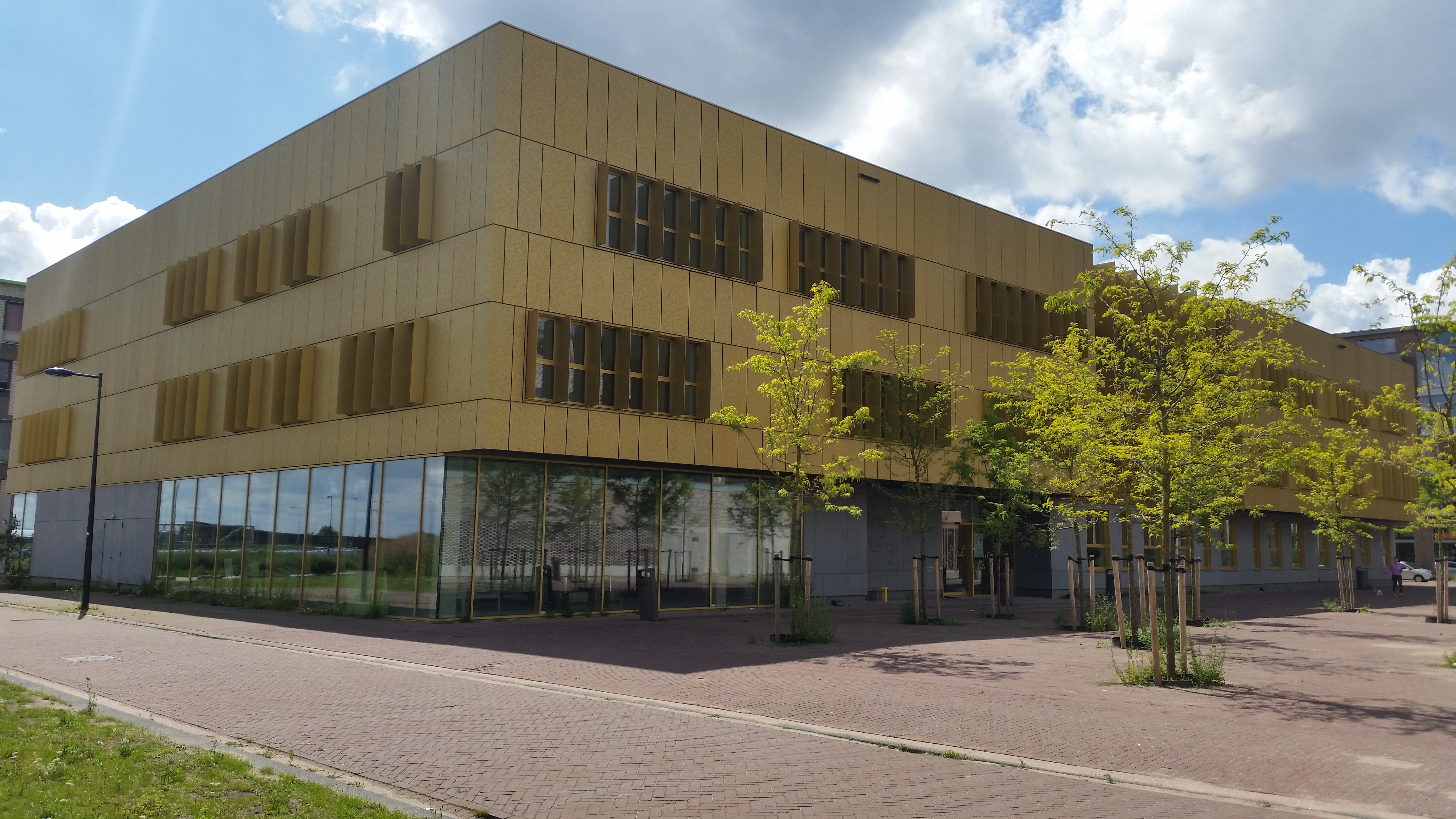 Impressie van het Geertje Wielemaplein op Zeebrugereiland